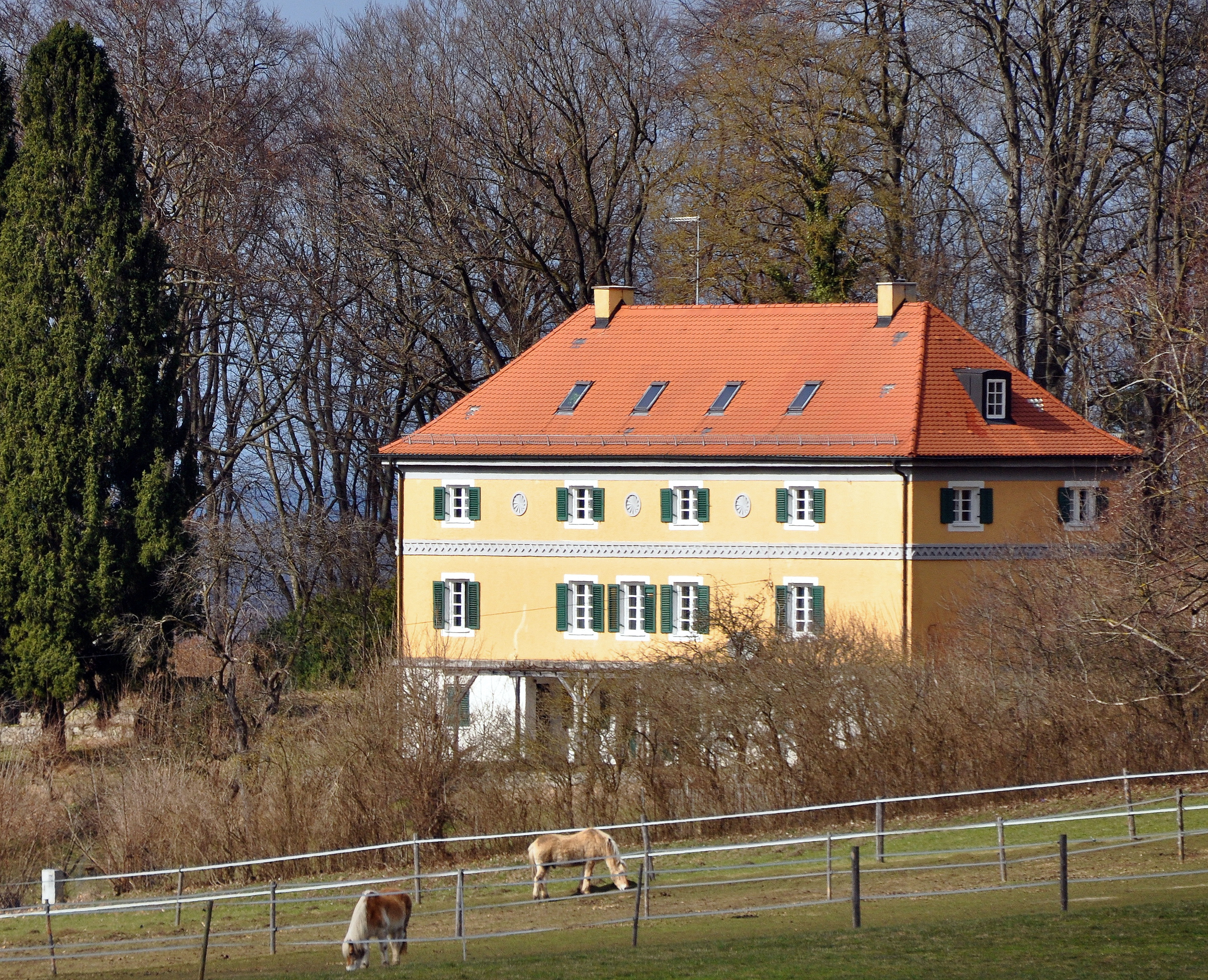 Villa des Künstlers Fritz Helmuth Ehmcke in Widdersberg am Ammersee (Ortsteil von Herrsching); langgestreckter, zweigeschossiger Walmdachbau im Stil des Neuklassizismus; erbaut 1922-1924; unter Denkmalschutz